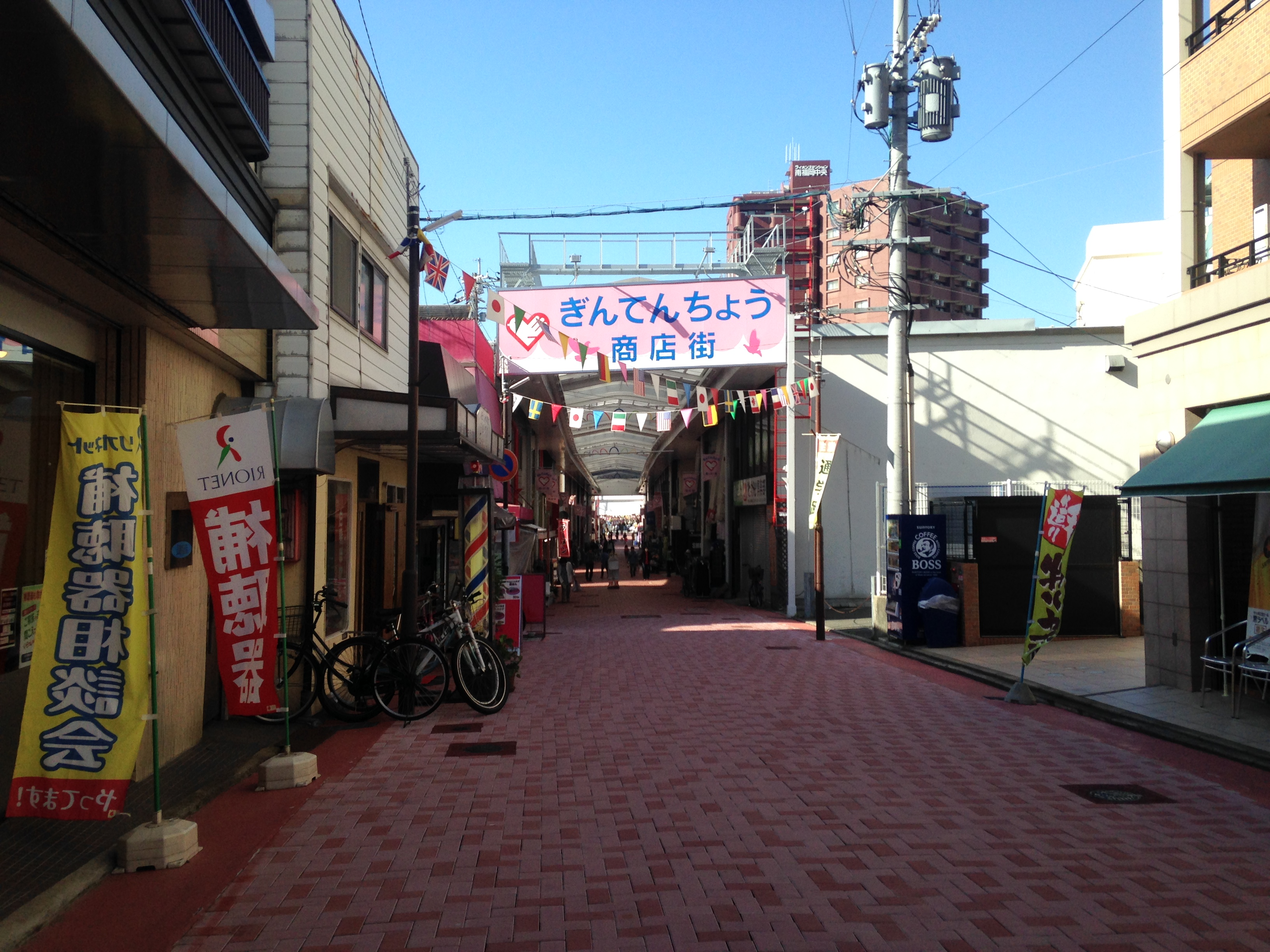 銀天町商店街南側の入り口